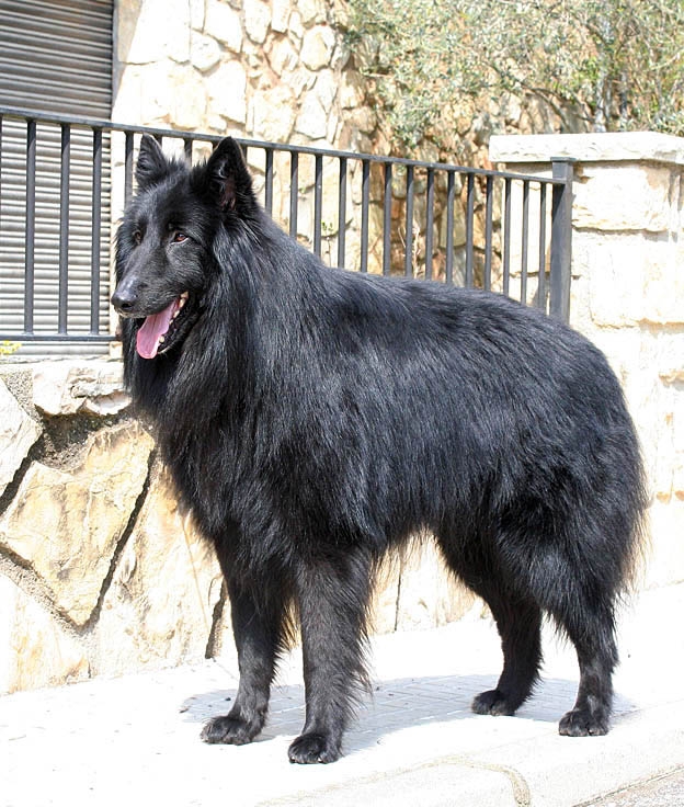 sujeto Recomendado del club Frances Campeon del C.E.P.P.B. Campeon de España Fredy de Belliamici